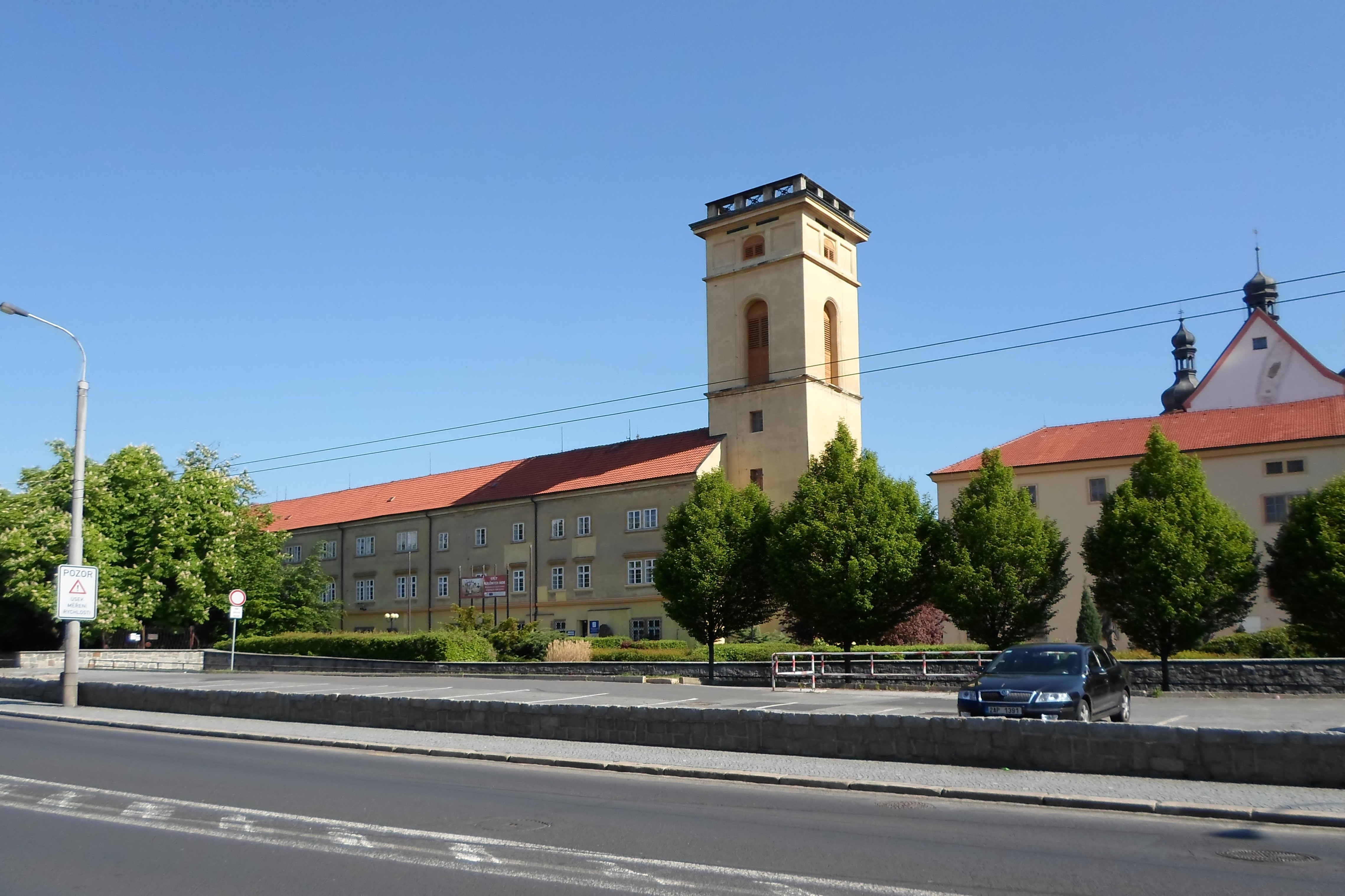 Kolej jezuitská (Chomutov), 1. máje, Chomutov